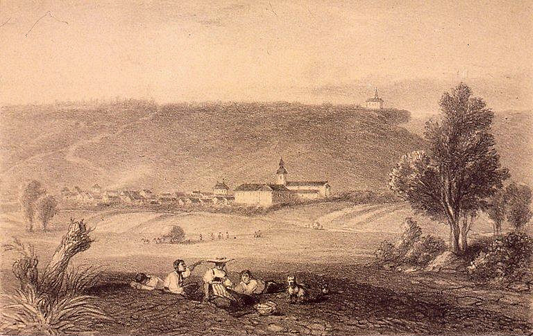 St Jean des Choux et la Chapelle de St Michel. Bibliothèque nationale et universitaire de Strasbourg